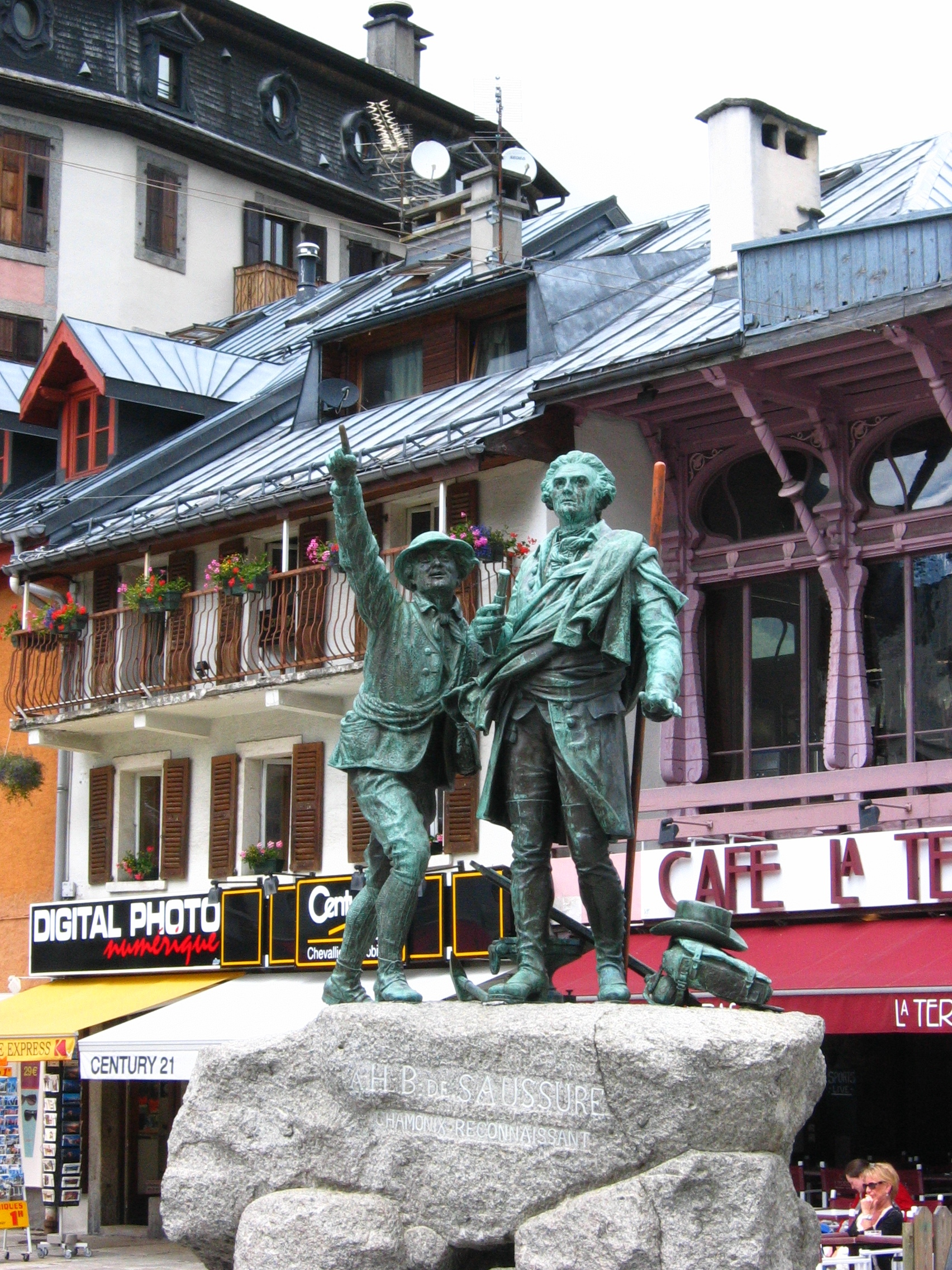 Statue de Saussure à Chamonix